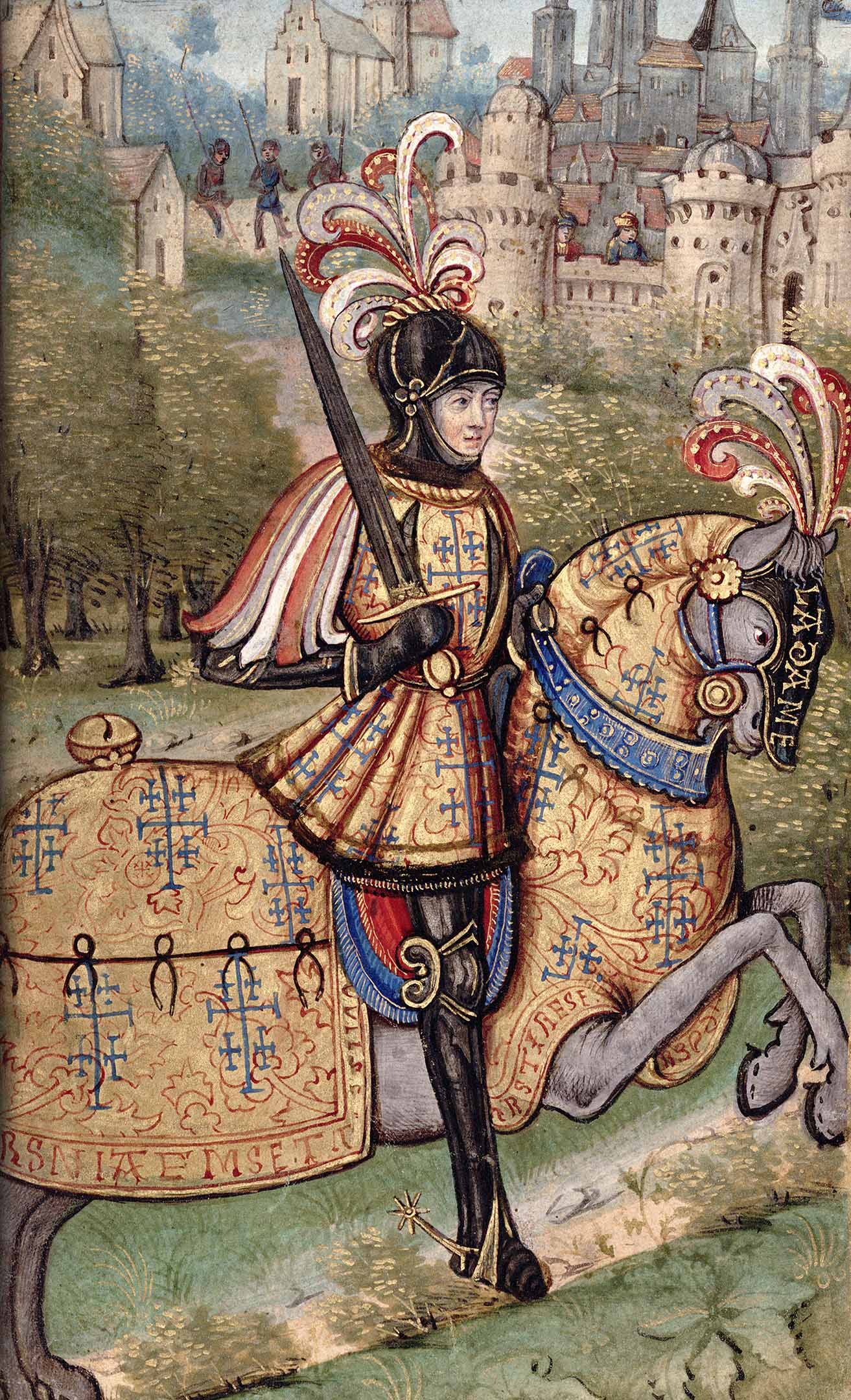 René II. von Lothringen, Darstellung in der Handschrift von Pierre de Blarru: Nancéide, Musée Lorraine